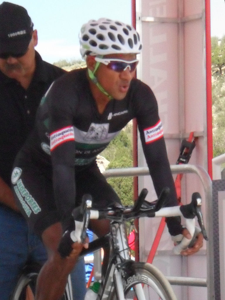 Prologue (Colorado Springs) du Tour du Colorado 2011